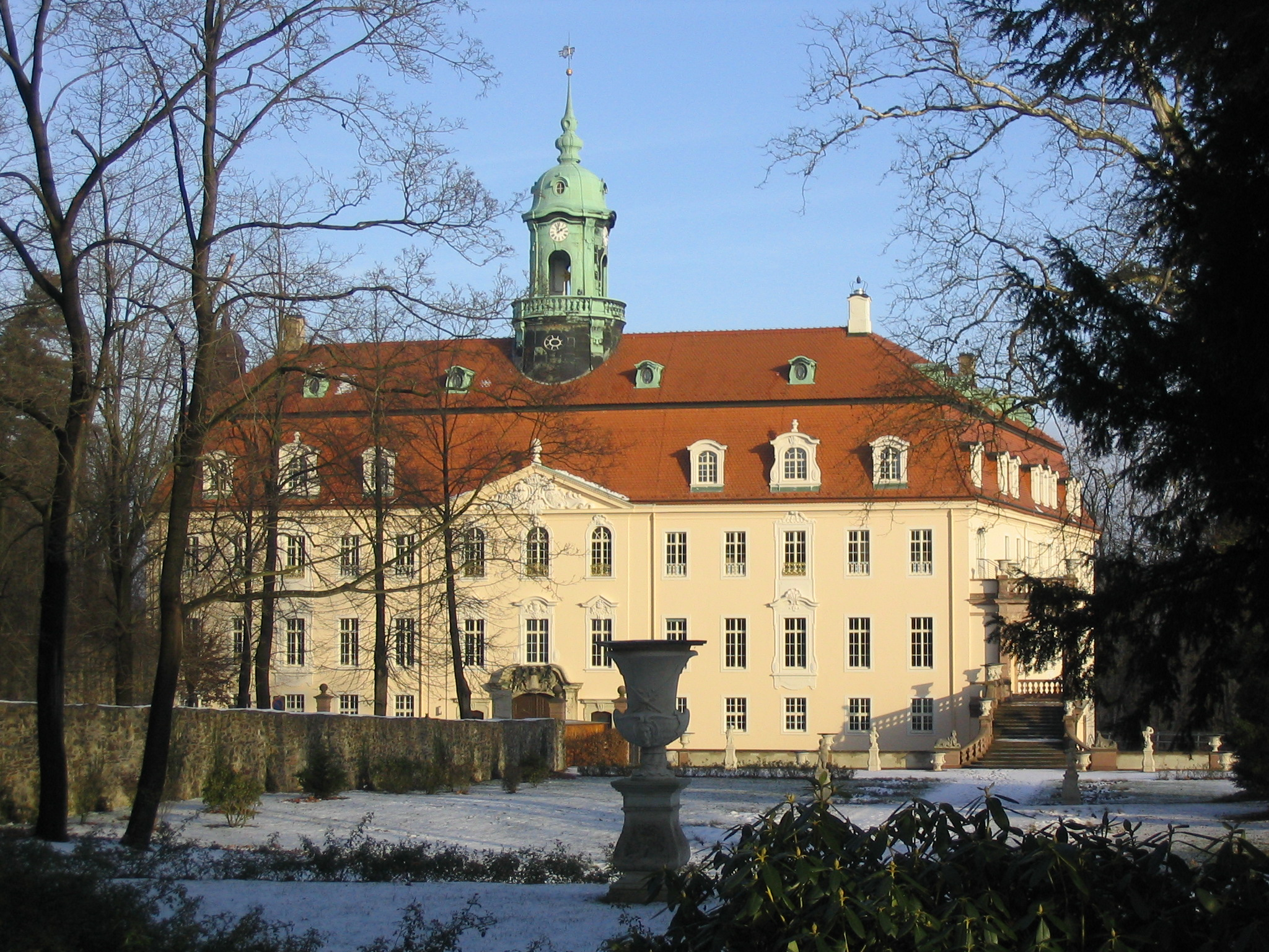 Schloss Lichtenwalde bei Niederwiesa, vom Park aus aufgenommen